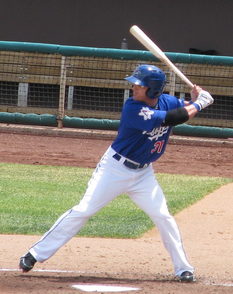 Jay Gibbons